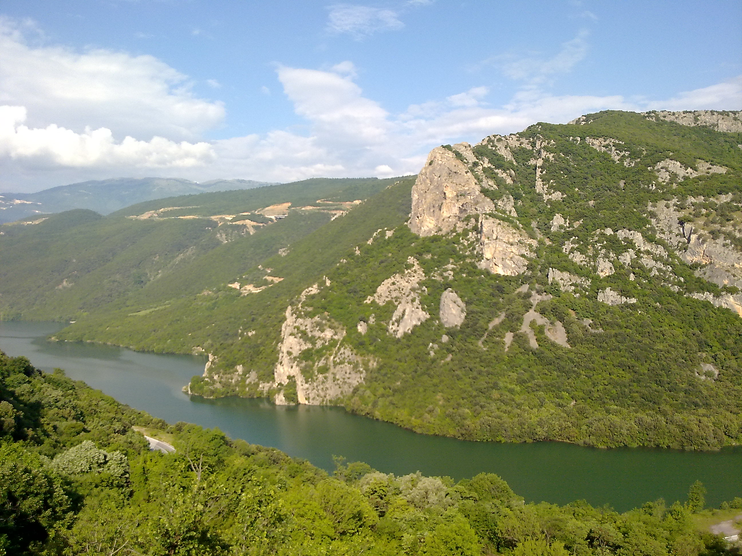 θέα στον Αλιακμονα